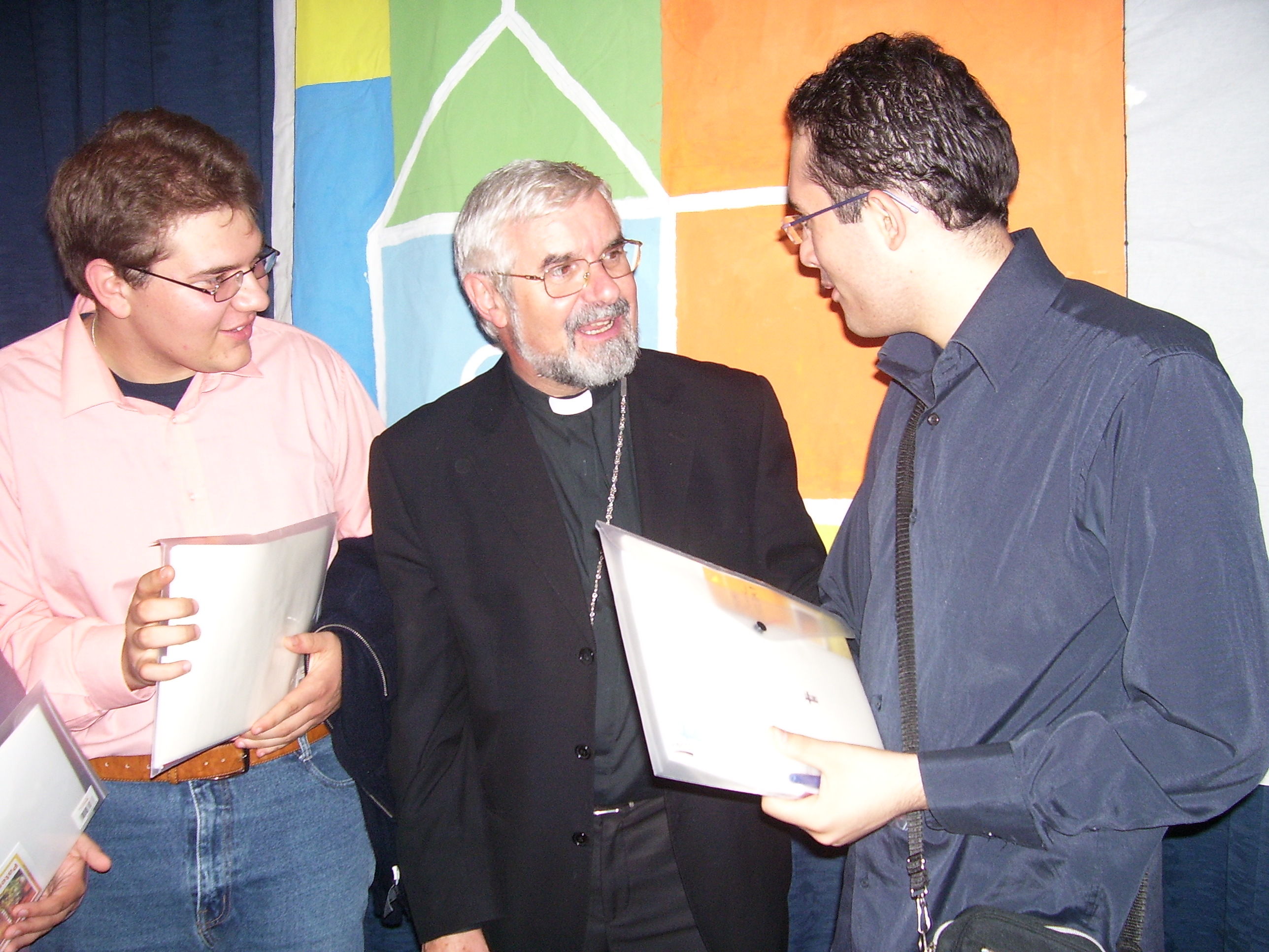 Giancarlo Maria Bregantini, Arcivescovo di Campobasso-Boiano